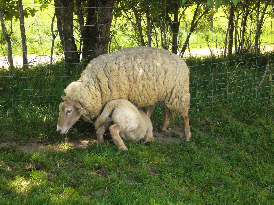 la tétée :brebis et son agneau